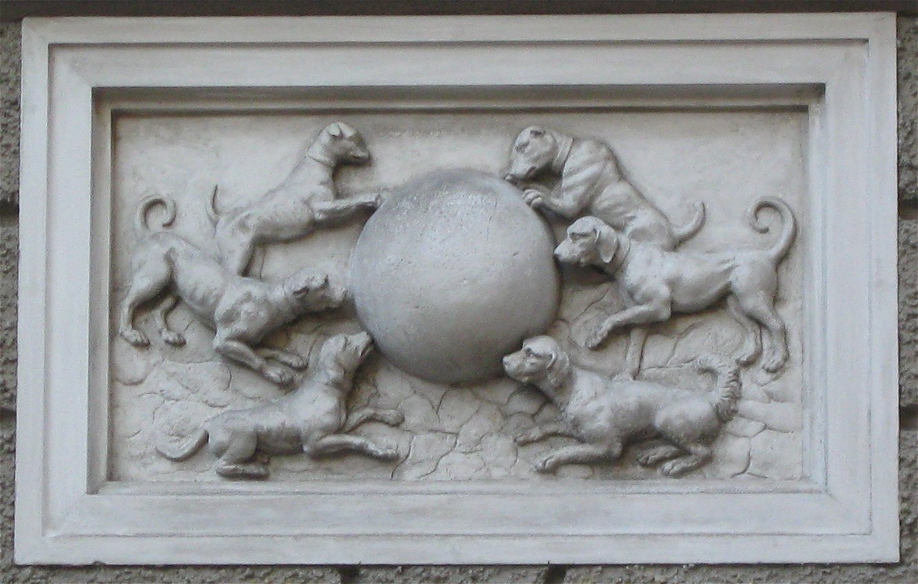 München, Hackenstraße 10; Haus zur Hundskugel, Holzrelief von Roman Anton Boos